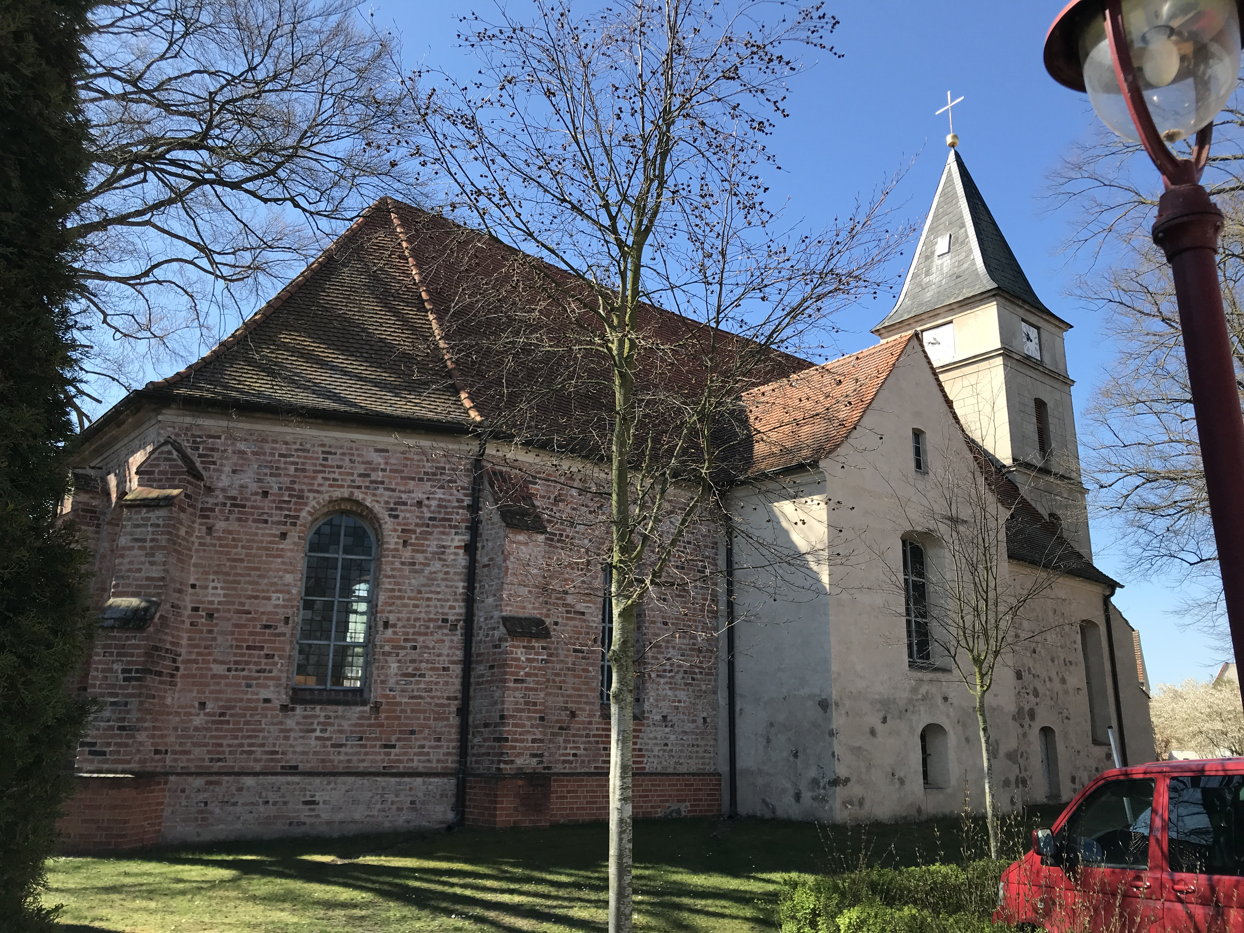 Die Stadtkirche St. Lambertus ist eine im Kern spätgotische Basilika, die nach einem Brand 1776 erneuert wurde. Die Kirchenausstattung stammt einheitlich aus dieser Zeit.